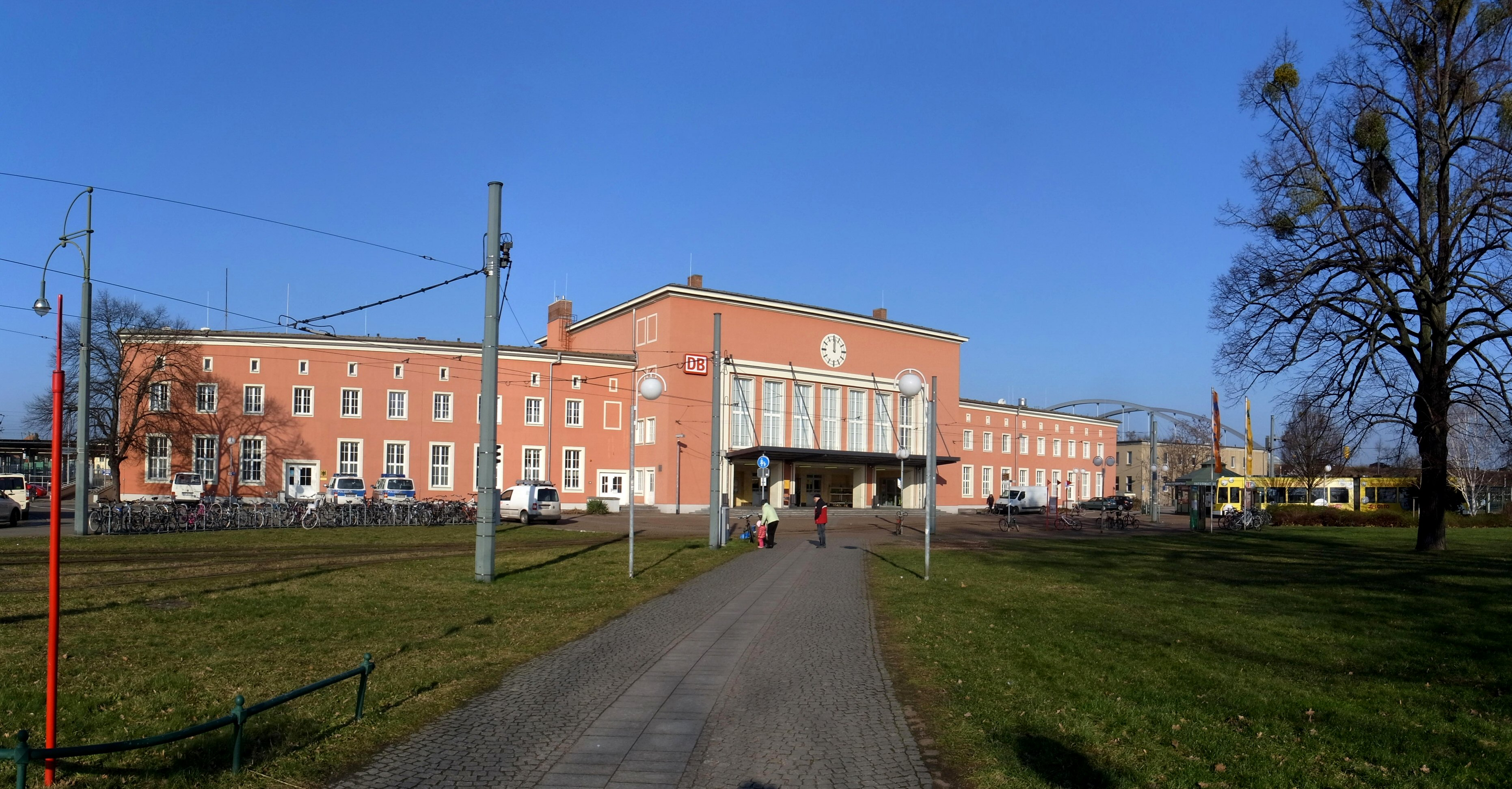 Dessau-Roßlau, Fritz-Hesse-Straße 47, Hauptbahnhof (Baudenkmal im Denkmalverzeichniss Sachsen-Anhalt, Erfassungsnummer: 094 40889 000 000 000 000 [1])